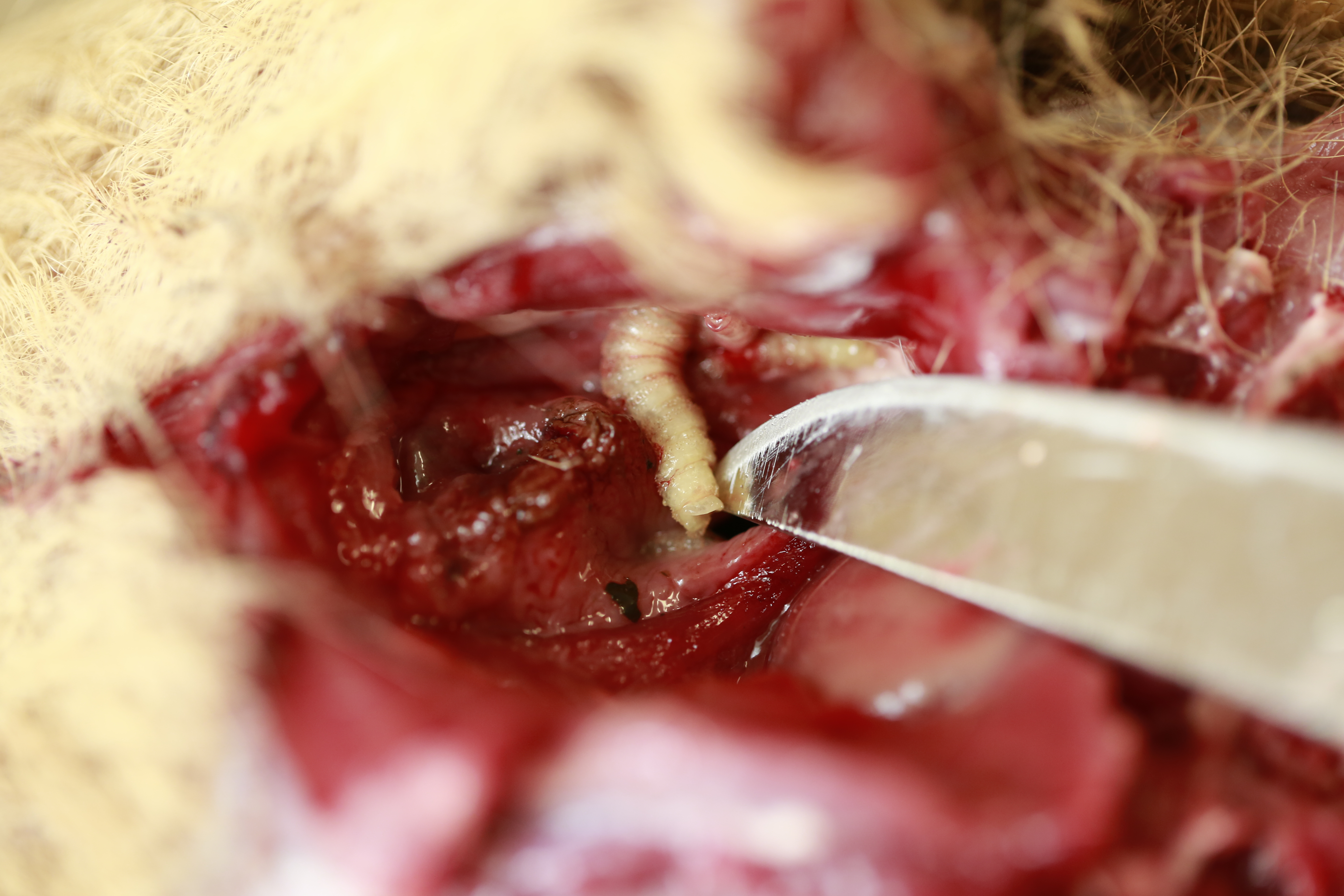 Reh-Rachendasseln im Schlund des Wirtstieres, eines Rehbock-Jährlings. Ansicht trägerseitig in das abgeschärfte Haupt. Es sind 3 Exemplare des Parasiten zu erkennen.